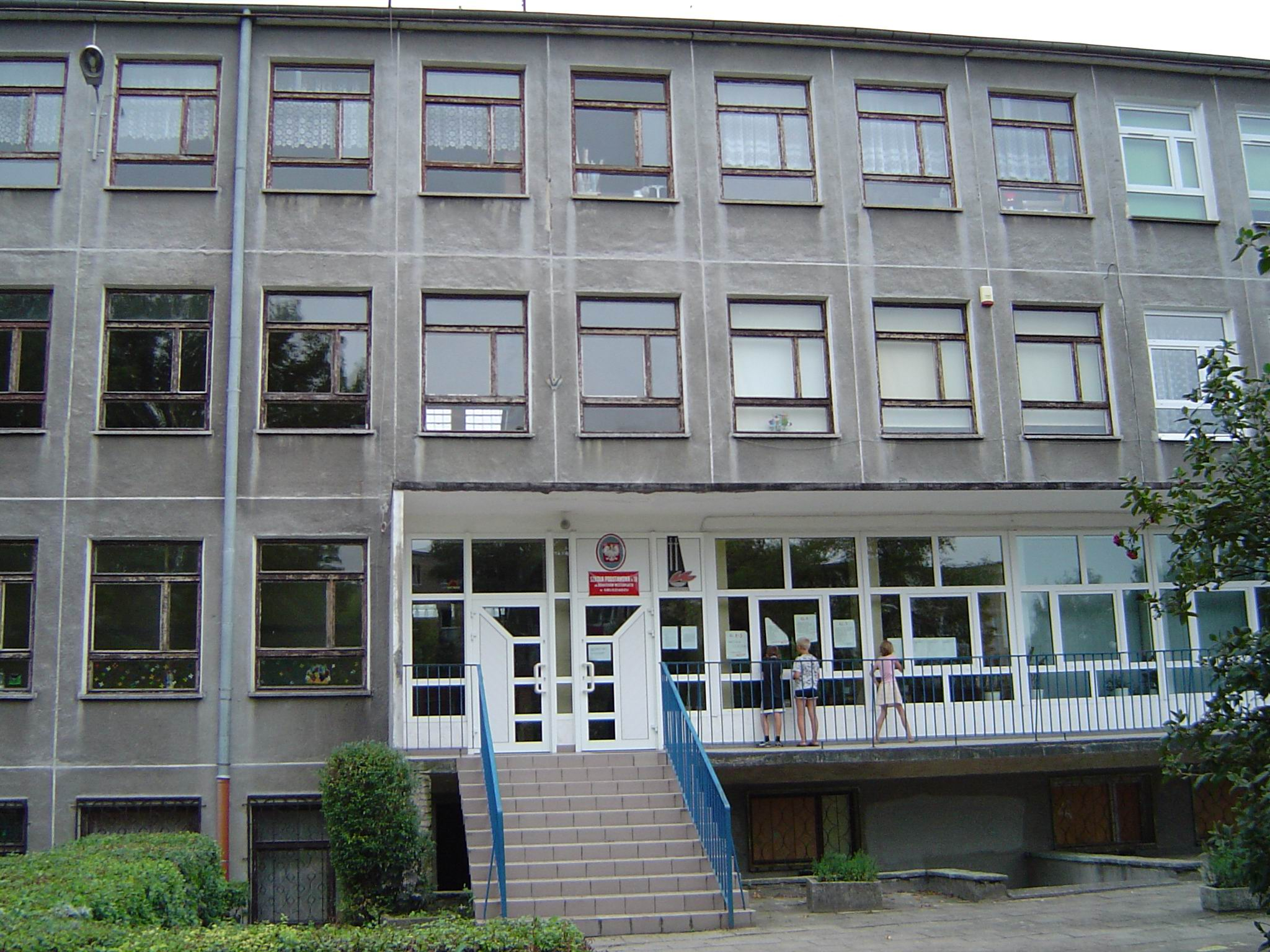 Szkoła Podstawowa nr 18 w Grudziądzu